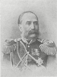 Граф Густав Густавович Армфельт (1793—1856).